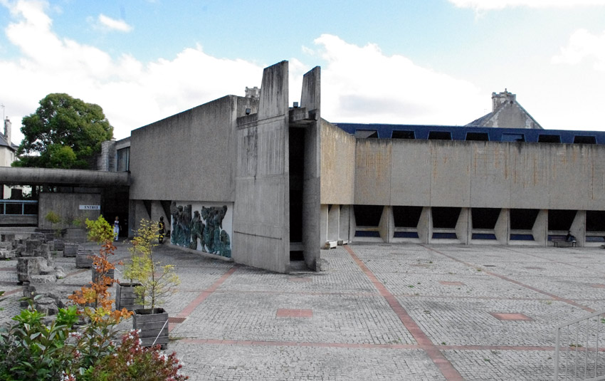 Cour et entrée du Musée Sainte-Croix, Poitiers